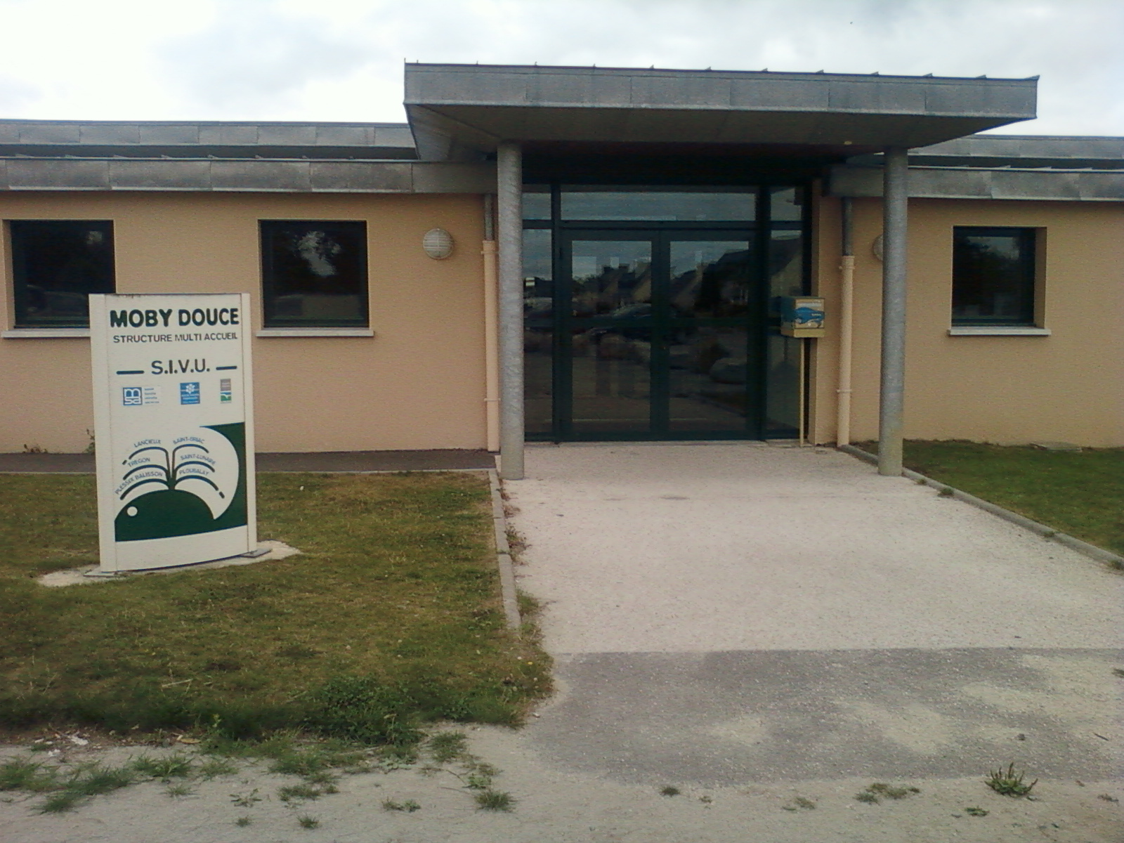 Crèche de Ploubalay. (Côtes-d'Armor, région Bretagne).